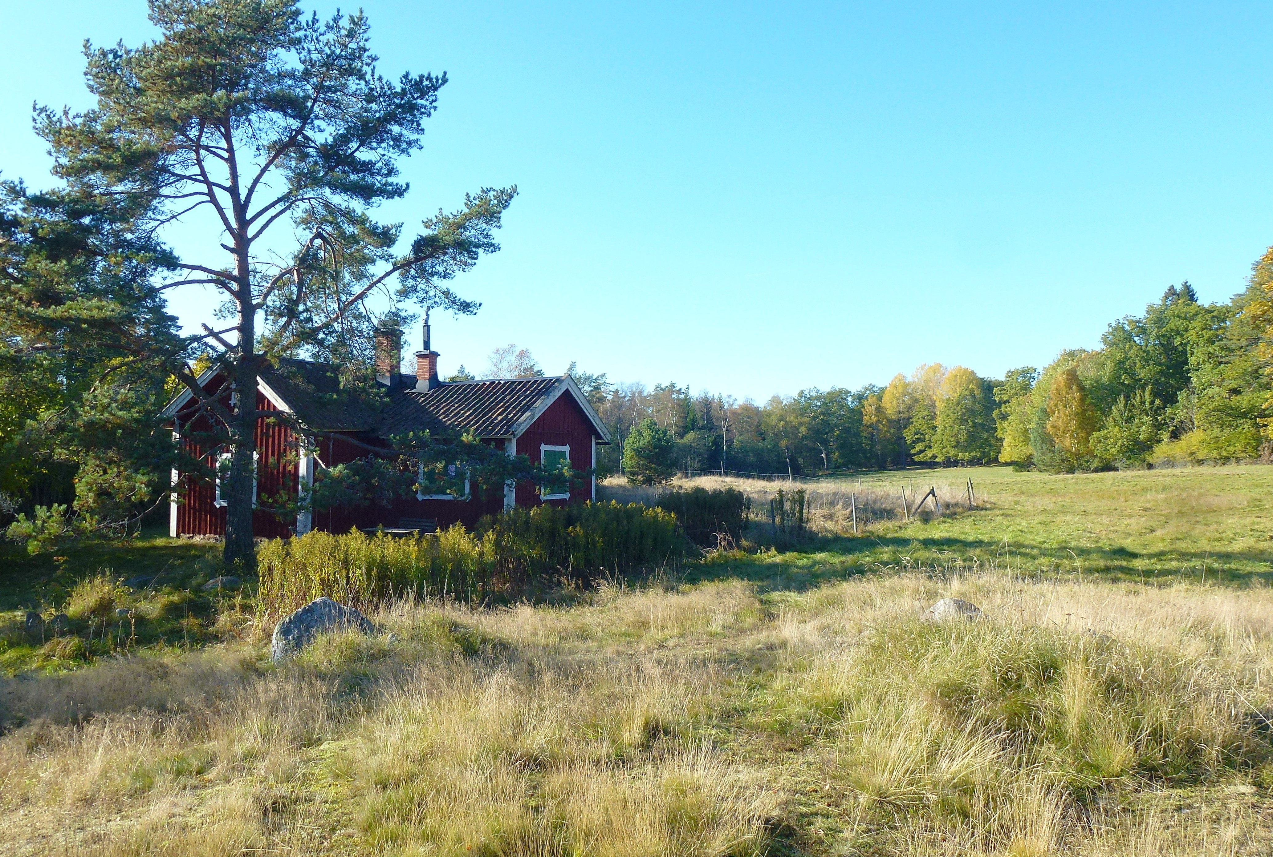 Torpet Sanda, tillhör Erstavik